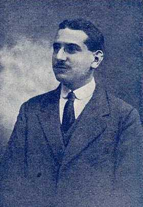 José Casais Santaló, fotografía en Vida Gallega 1915